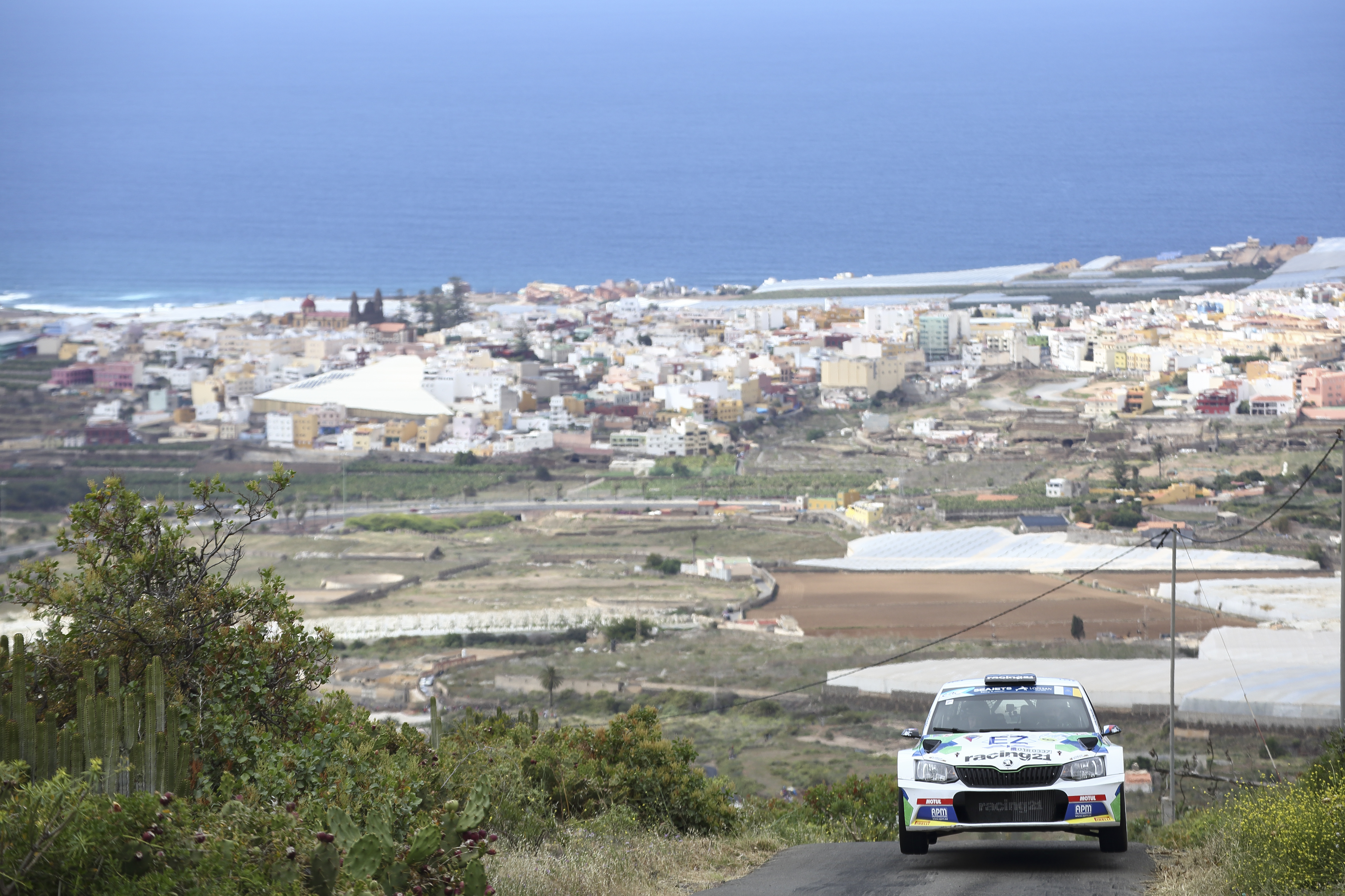 La isla de Gran Canaria volvió a ser, entre los días 2 y 4 de mayo de 2019, punto de encuentro de algunos de los mejores equipos de rallies. Una vez más, el Rally Islas Canarias repitió como la segunda cita de un calendario de ocho pruebas del FIA European Rally Championship, el segundo certamen internacional más importante de esta especialidad.